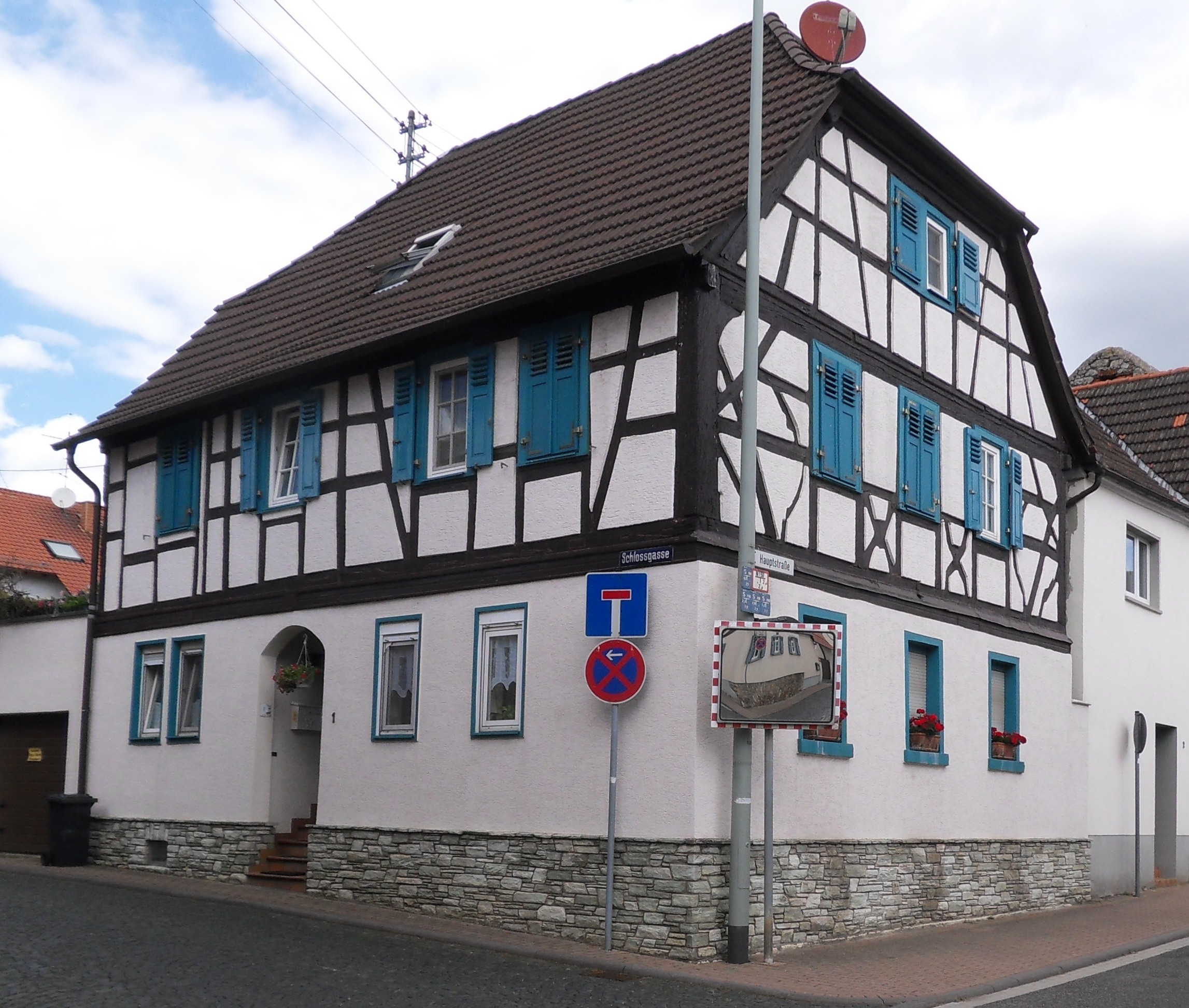 das denkmalgeschützte Alte Rathaus in Massenheim, Schloßgasse 2